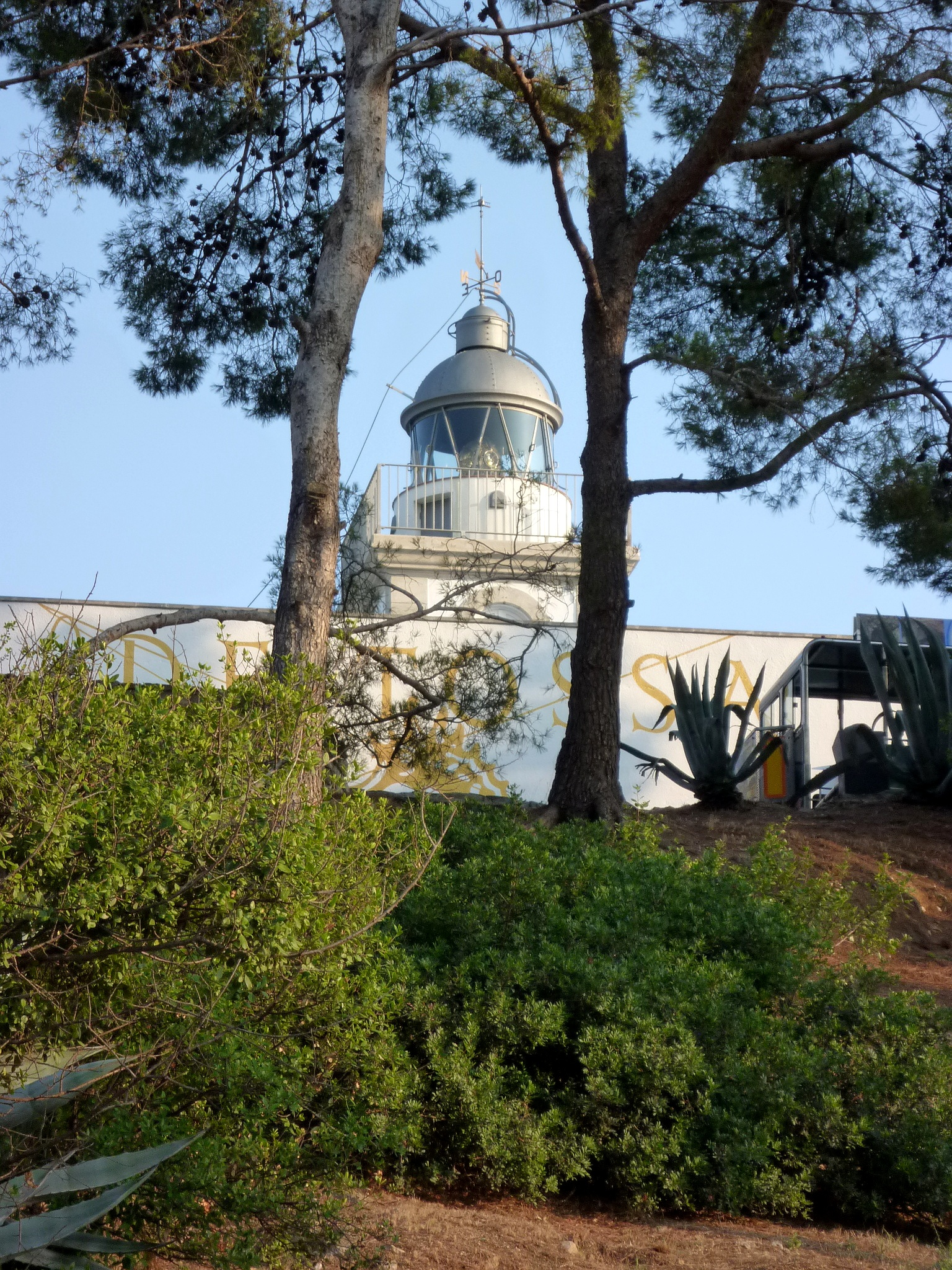 Far de Tossa (Tossa de Mar)